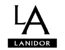 empresa de vestuário